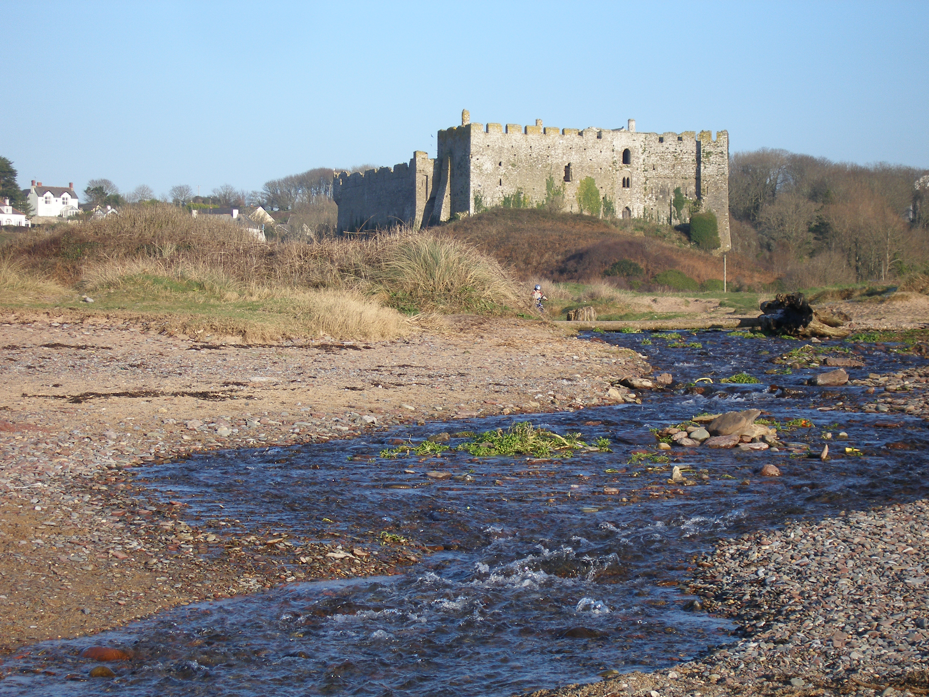 Manorbier Castle